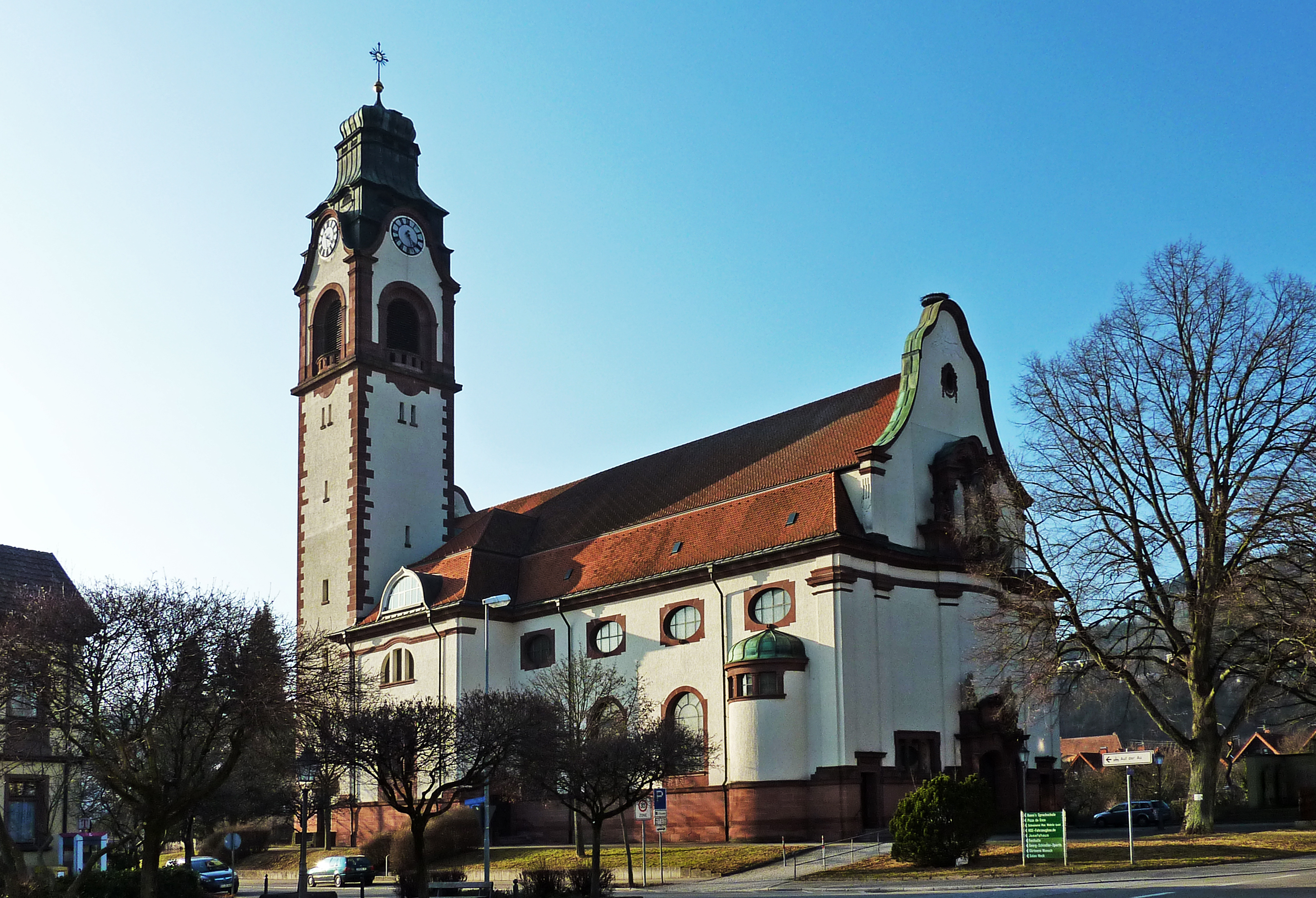 St. Josef, Kollnau, 1907-10 nach einem Plan des Leiters des Freiburger Erzbischöflichen Bauamtes Raimund Jeblinger erbaut.